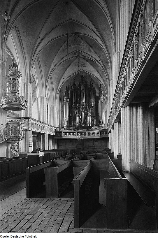 Original image description from the Deutsche Fotothek Tangermünde. St. Stephanskirche, Inneres, Blick zur Orgel